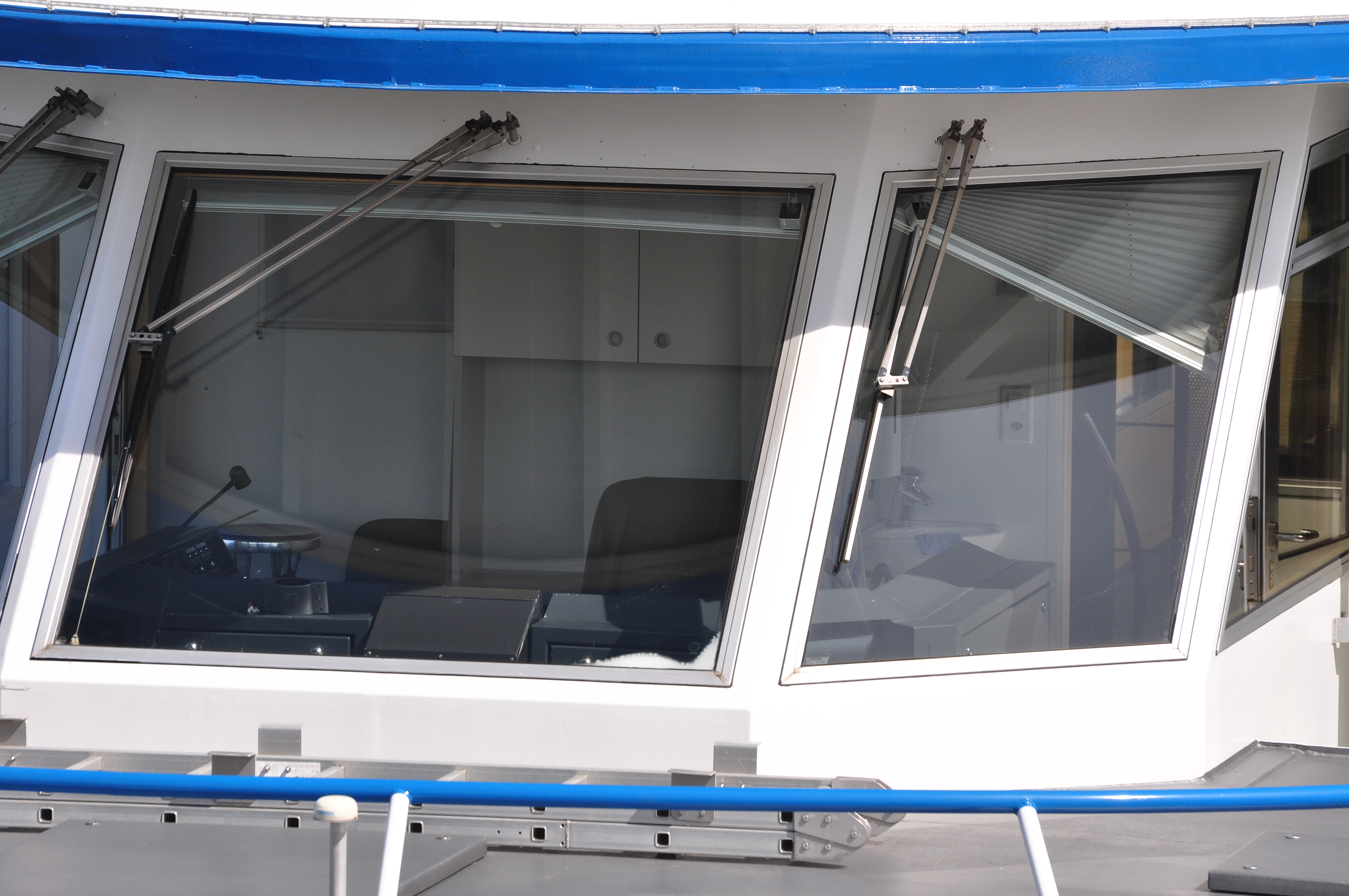 Zürichsee-Schiffahrtsgesellschaft (ZSG) Werft in Zürich-Wollishofen (Switzerland) : Pfannenstiel